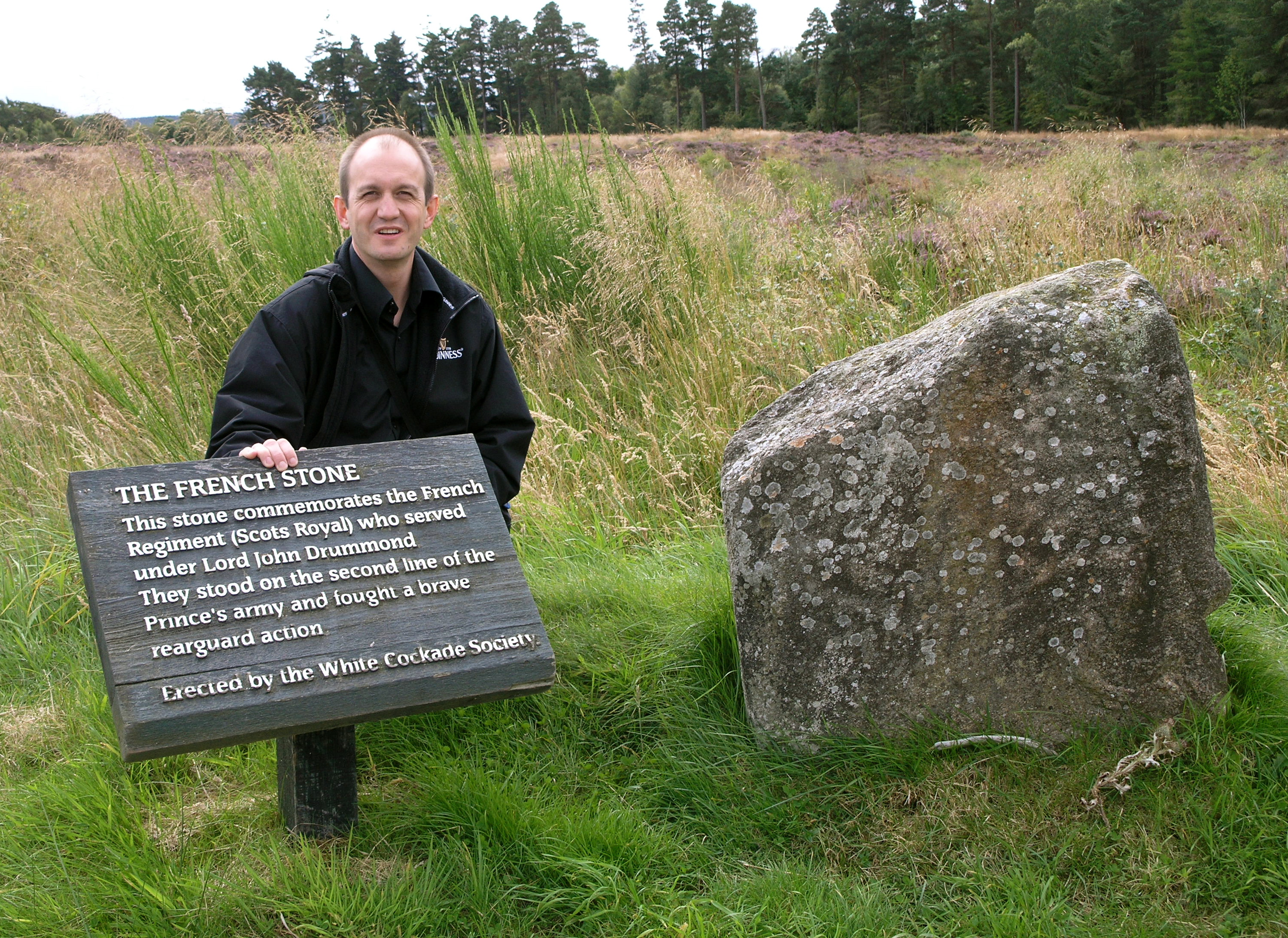 Frédéric Bey en Écosse, août 2007